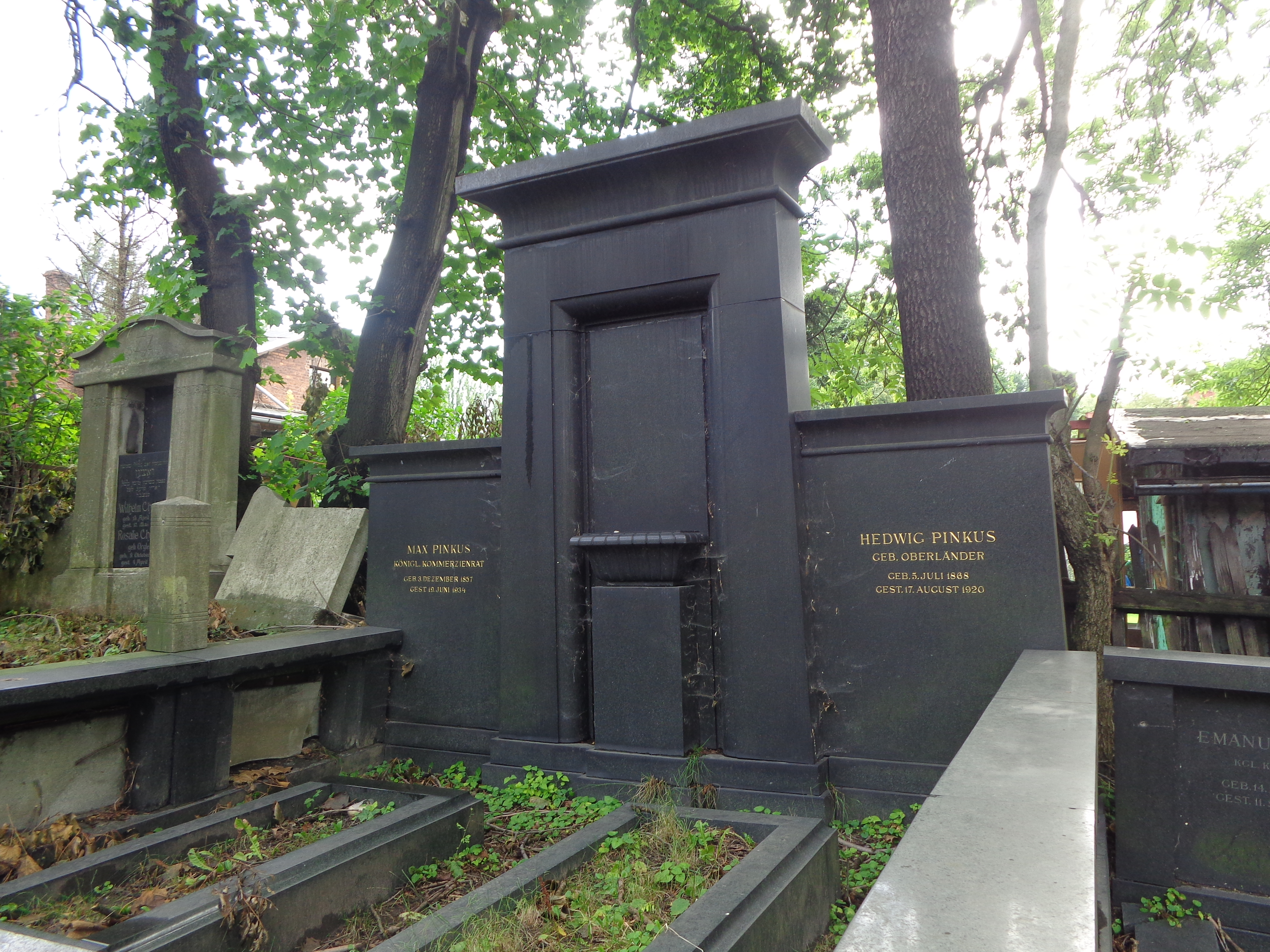 Grobowiec Maxa Pinkusa i jego żony Hedwig (Jadwigi) z domu Oberländer.